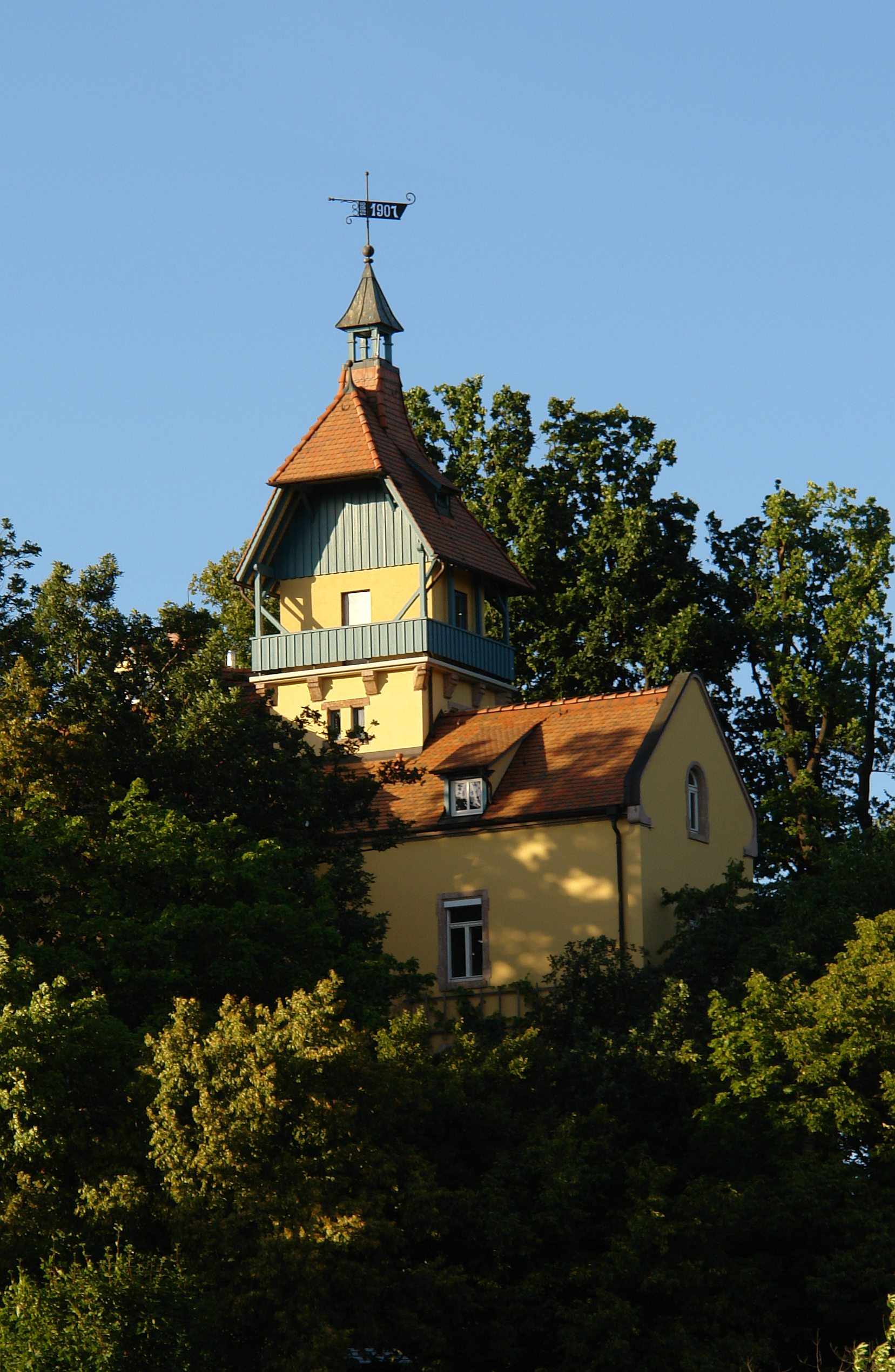 denkmalgeschützte Villa Wilhelmi im Hohlweg 12 in Niederwiesa